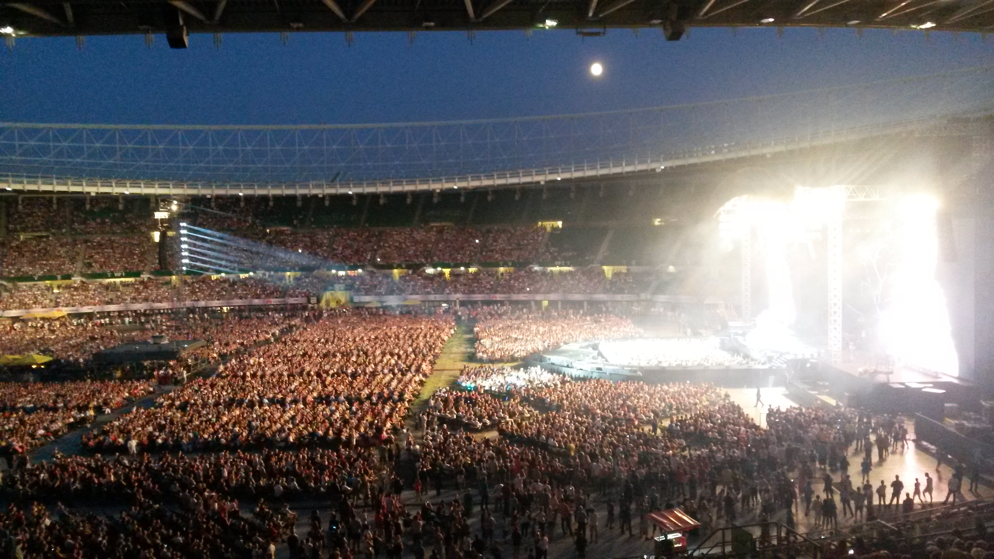 2. Wiener Konzert von Helene Fischer im Ernst-Happel-Stadion im Rahmen der Farbenstil-Tour am 1. Juli 2015.